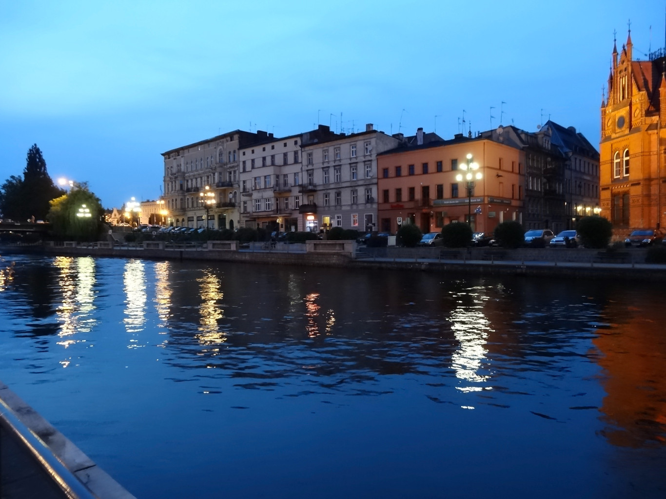 Północne nabrzeże Brdy w centrum Bydgoszczy